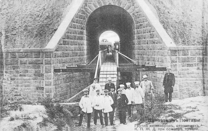 Полтавская железная дорога. Начало 20-го века